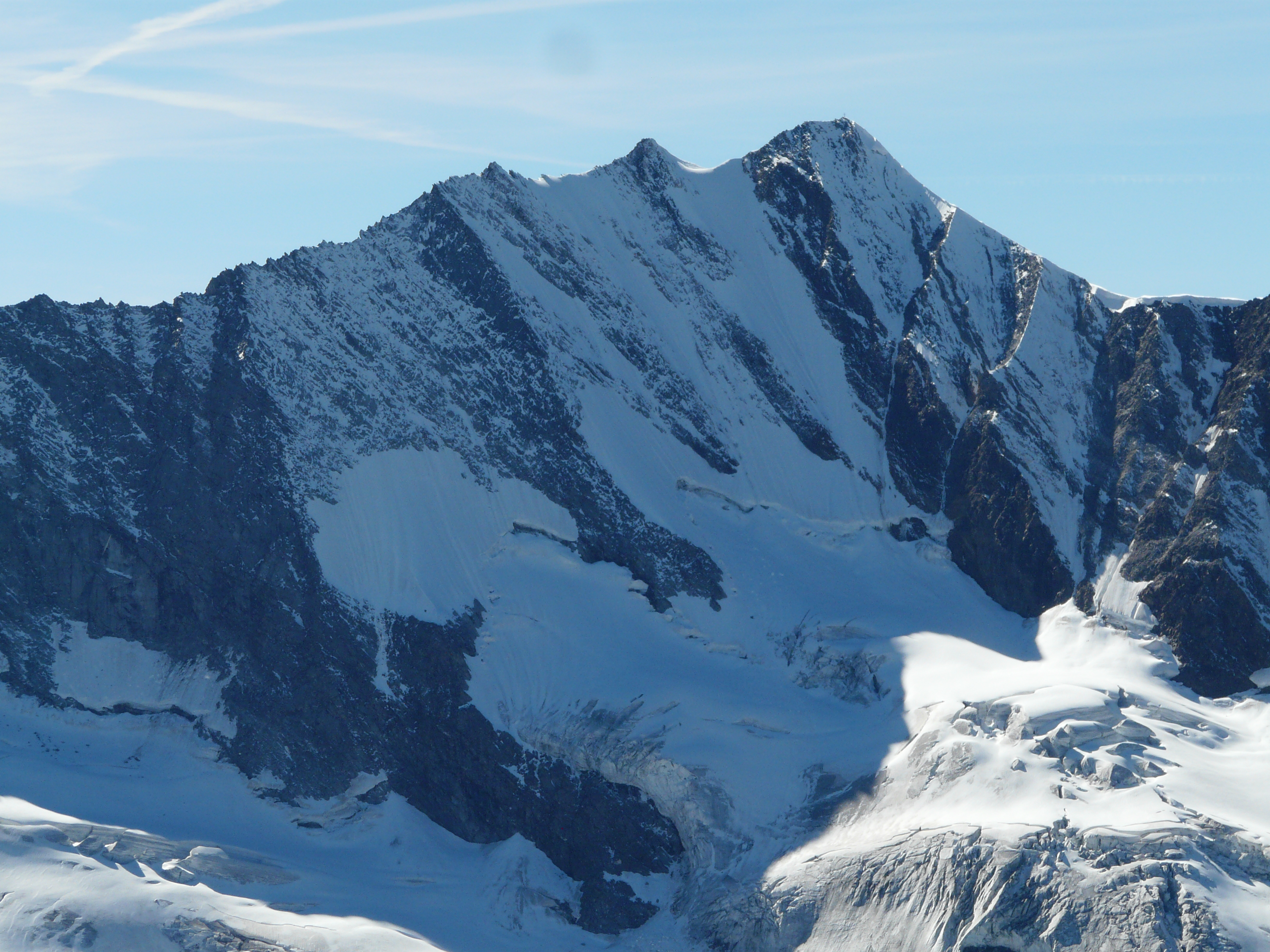 Nordwand des Hochfeilers (Blick vom Schönbichler Horn)